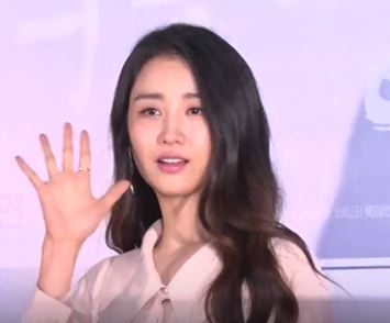 디스패치 구독 클릭! Dispatch Subscribe